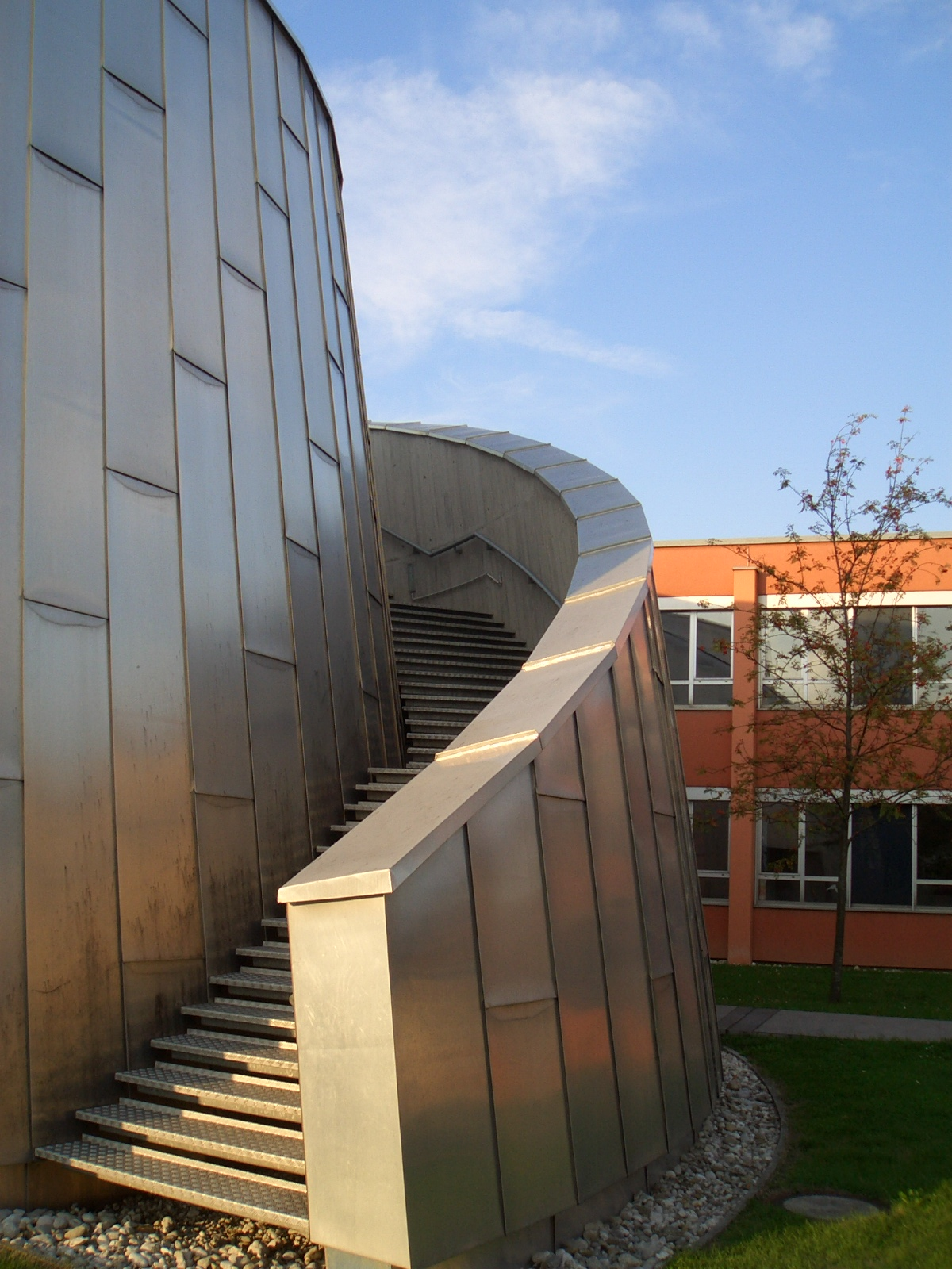 Gymnasium Wallererstraße in Wels, Austria